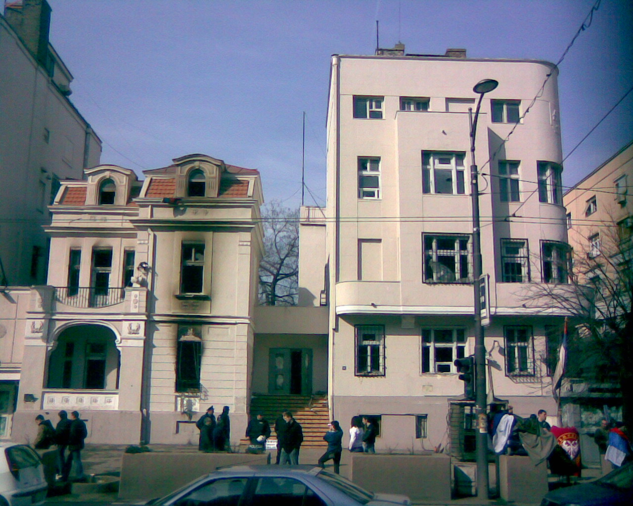 American Ambassy after February 21, 2008 in Belgrade/L'ambassade américaine le lendemain de la manifestation "Le Kosovo est le Serbie" du 21 février 2008, Belgrade